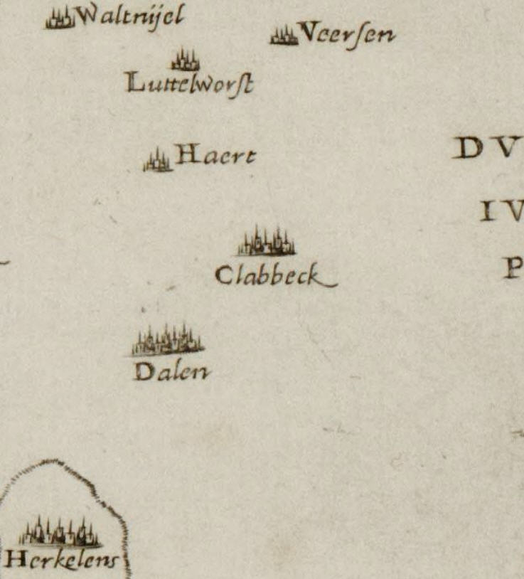 Gelriae, Cliviae, Iuliae, nec non aliarum regionum adiacentium nova descriptio